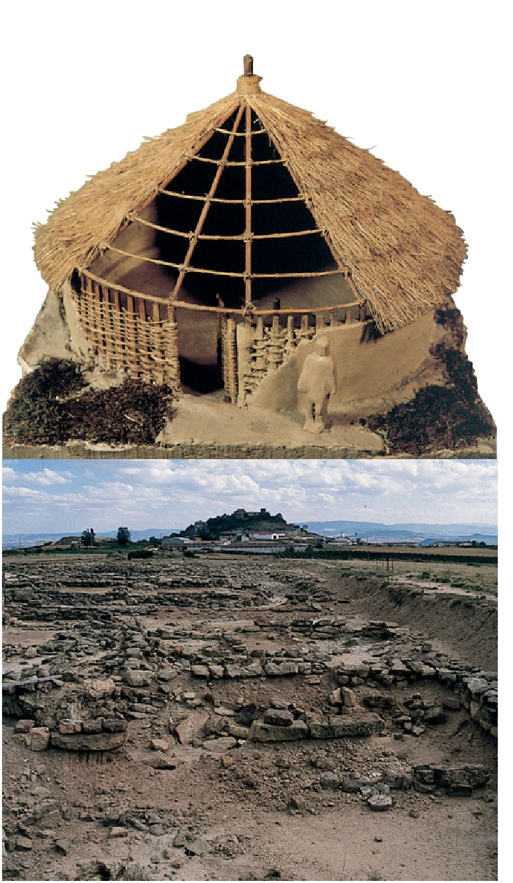 La Hoyako oin biribileko etxe baten maketa. La Hoyako bizilekuaren irudia, Biasterin (Araba)